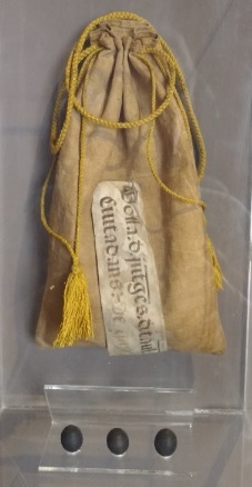 Bossa d'insaculació Material: fusta i cuir Mides: 26x17x3 cm MHG